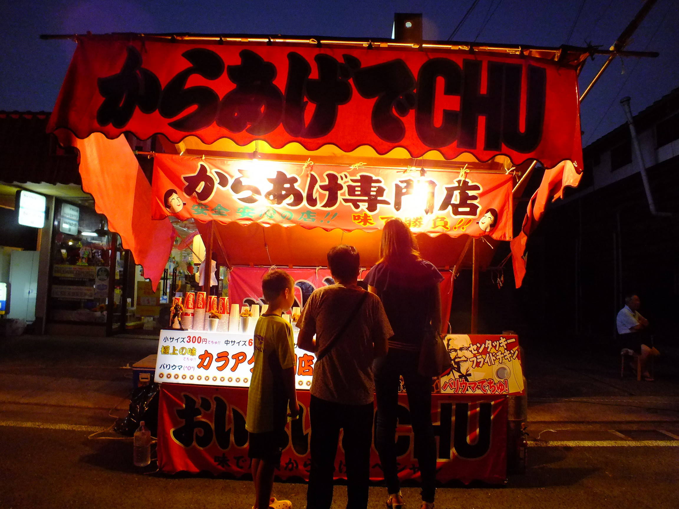 20140729 Ichijima-Kawasuso Matsuri 市島川裾祭（丹波市市島町）